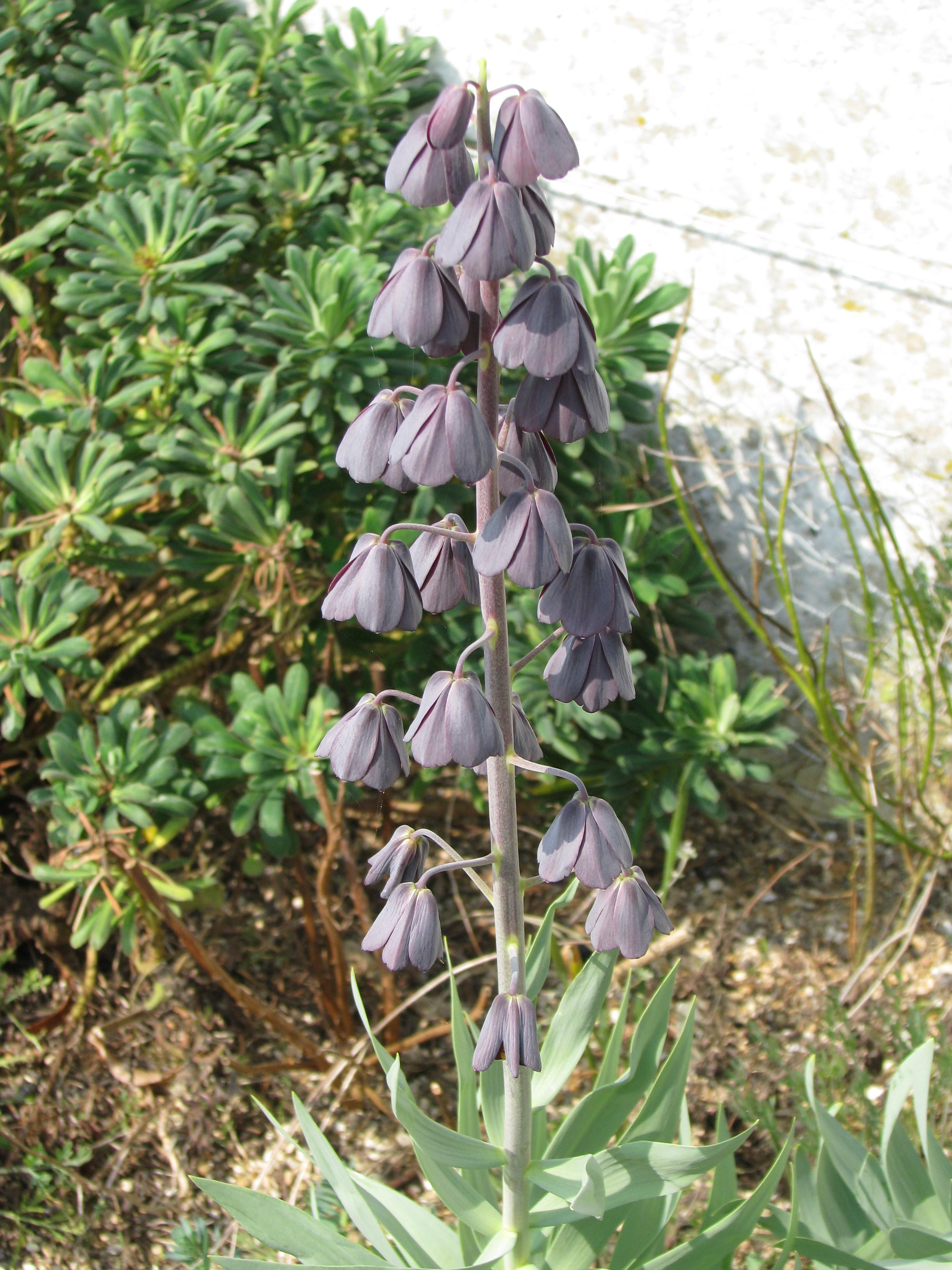 Fritillaria persica